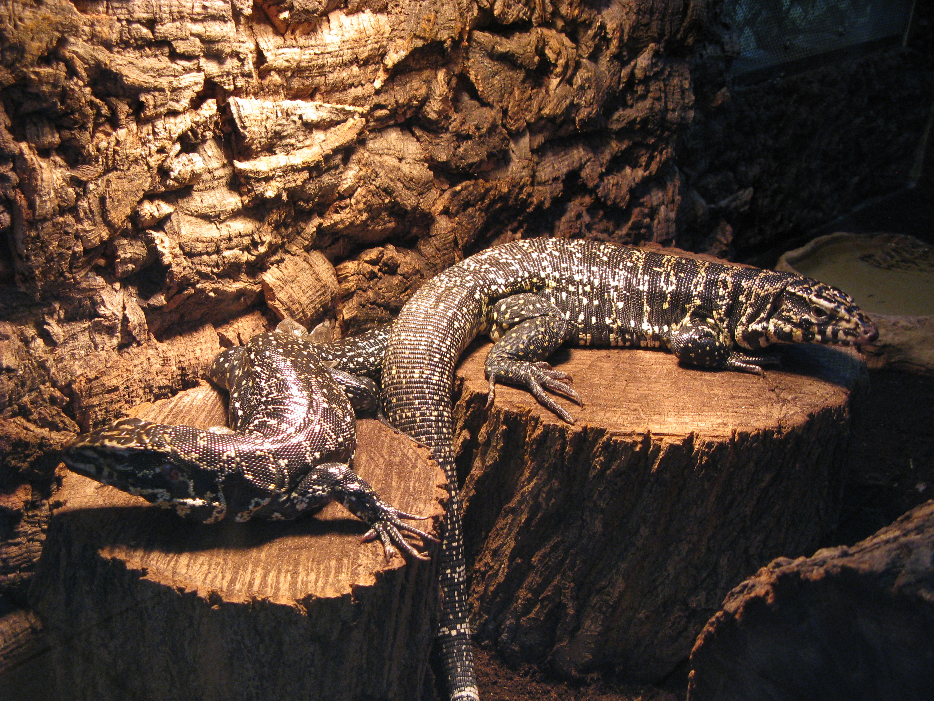 Teju złoty w Ogrodzie Zoobotanicznym w Toruniu